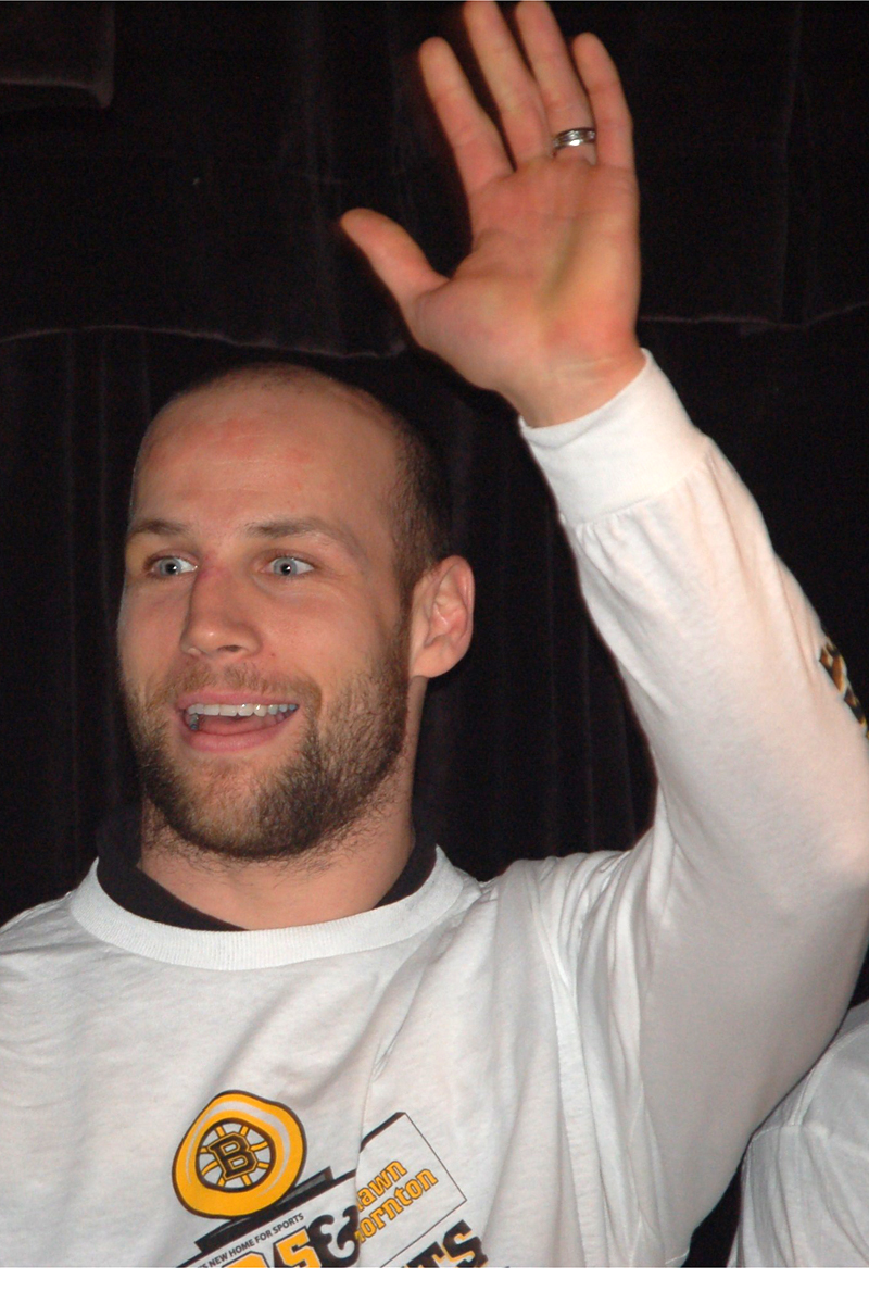 cfac7